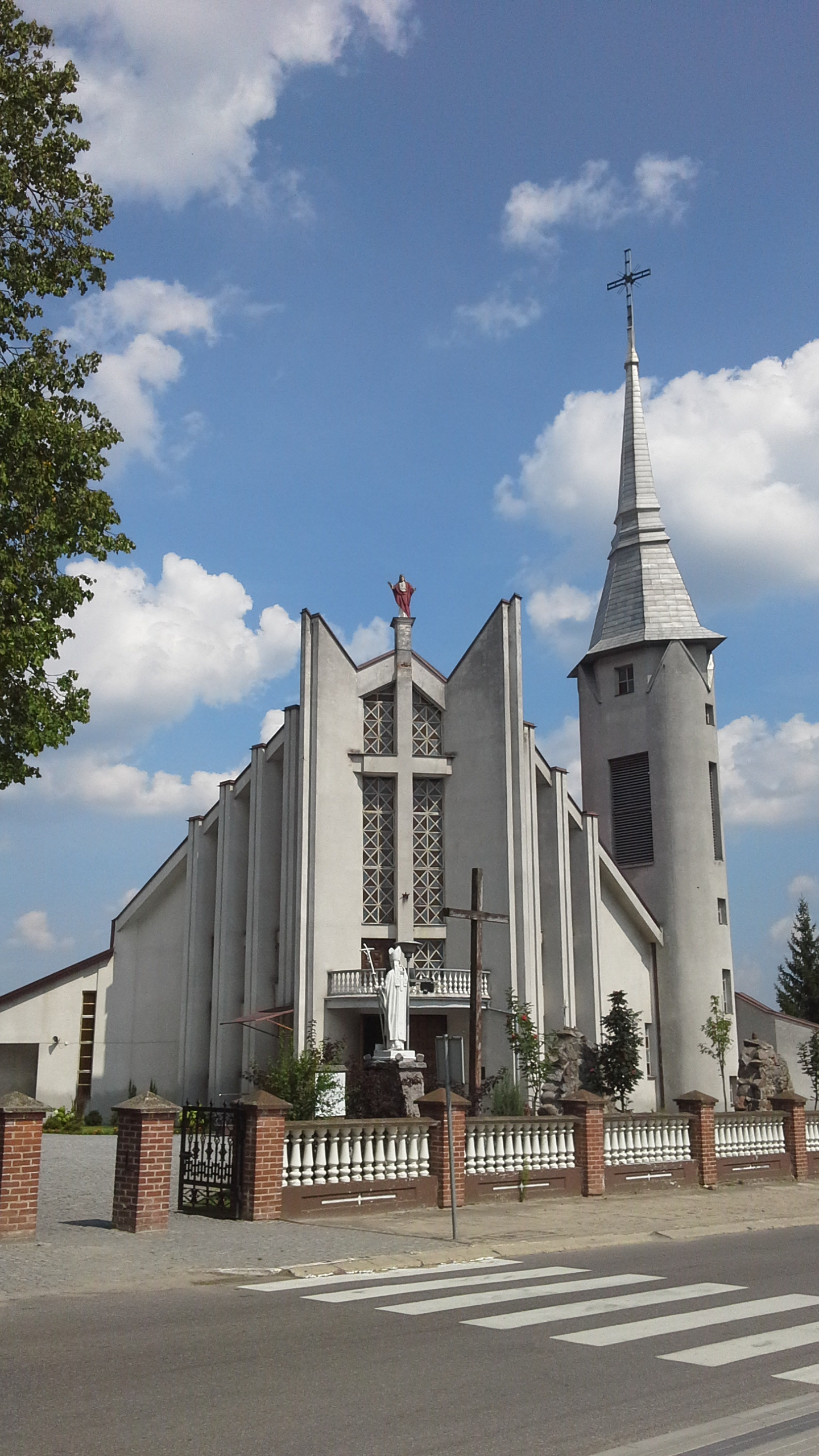 Nowy kościół katolicki w Grodzisku